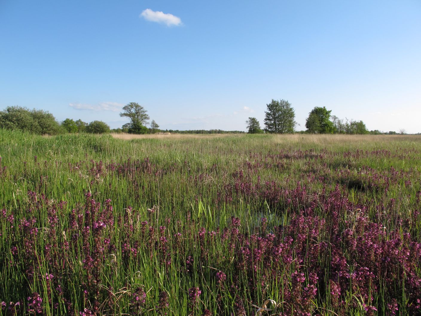 Moeraskartelblad in een rietland ten noordwesten van Kalenberg This is a photo or sound file made in De Weerribben-Wieden National Park in the Netherlands, with the main subject of the file in the category: landscapes